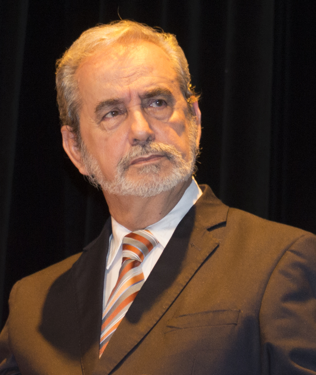 Antonio Santos en el Festival Internacional de Cine de Guayaquil